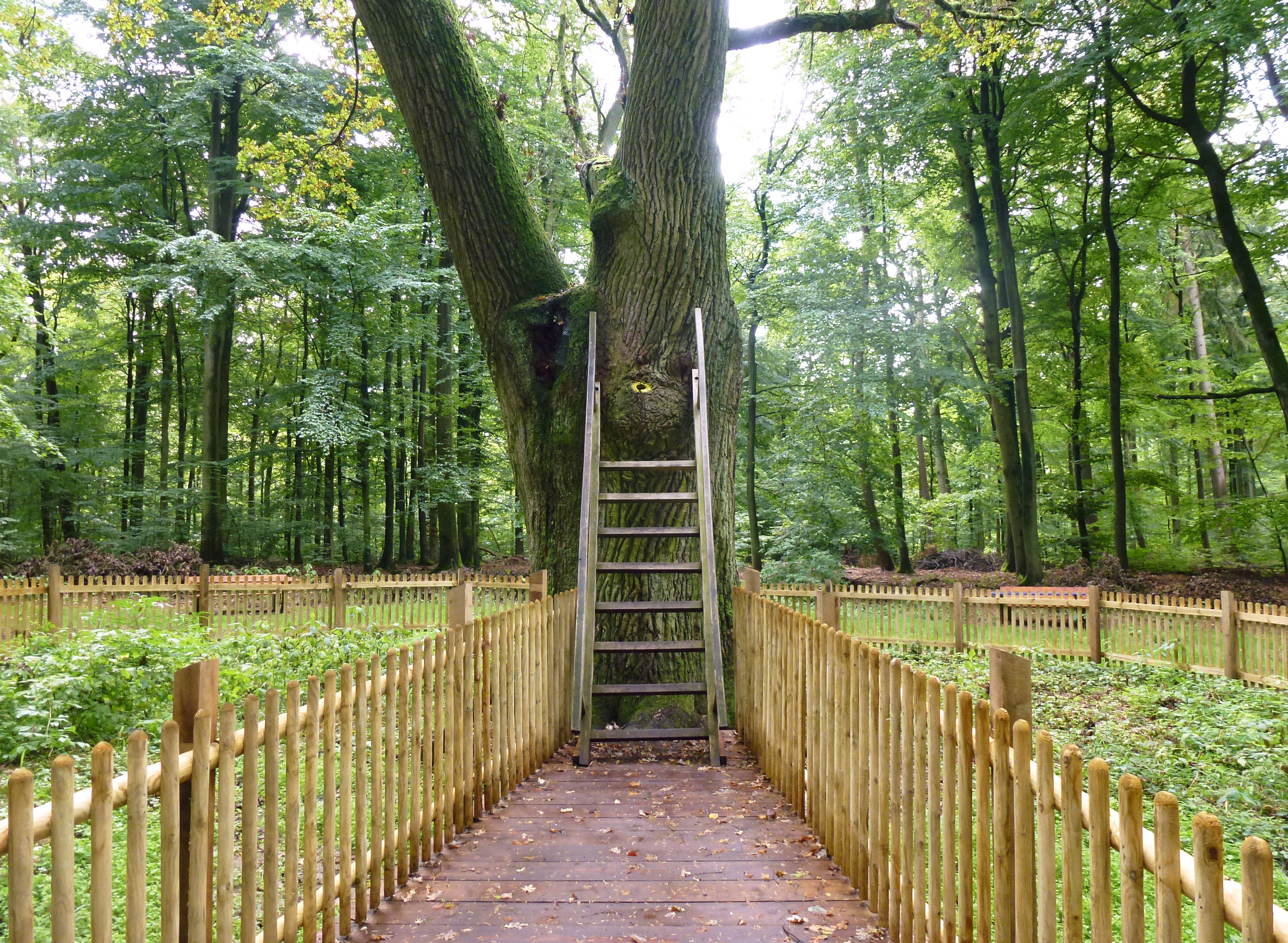 Die Bräutigamseiche im Dodauer Forst bei Eutin in Schleswig-Holstein.